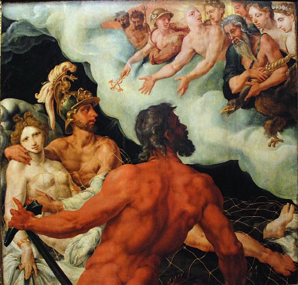 ? × ? cm